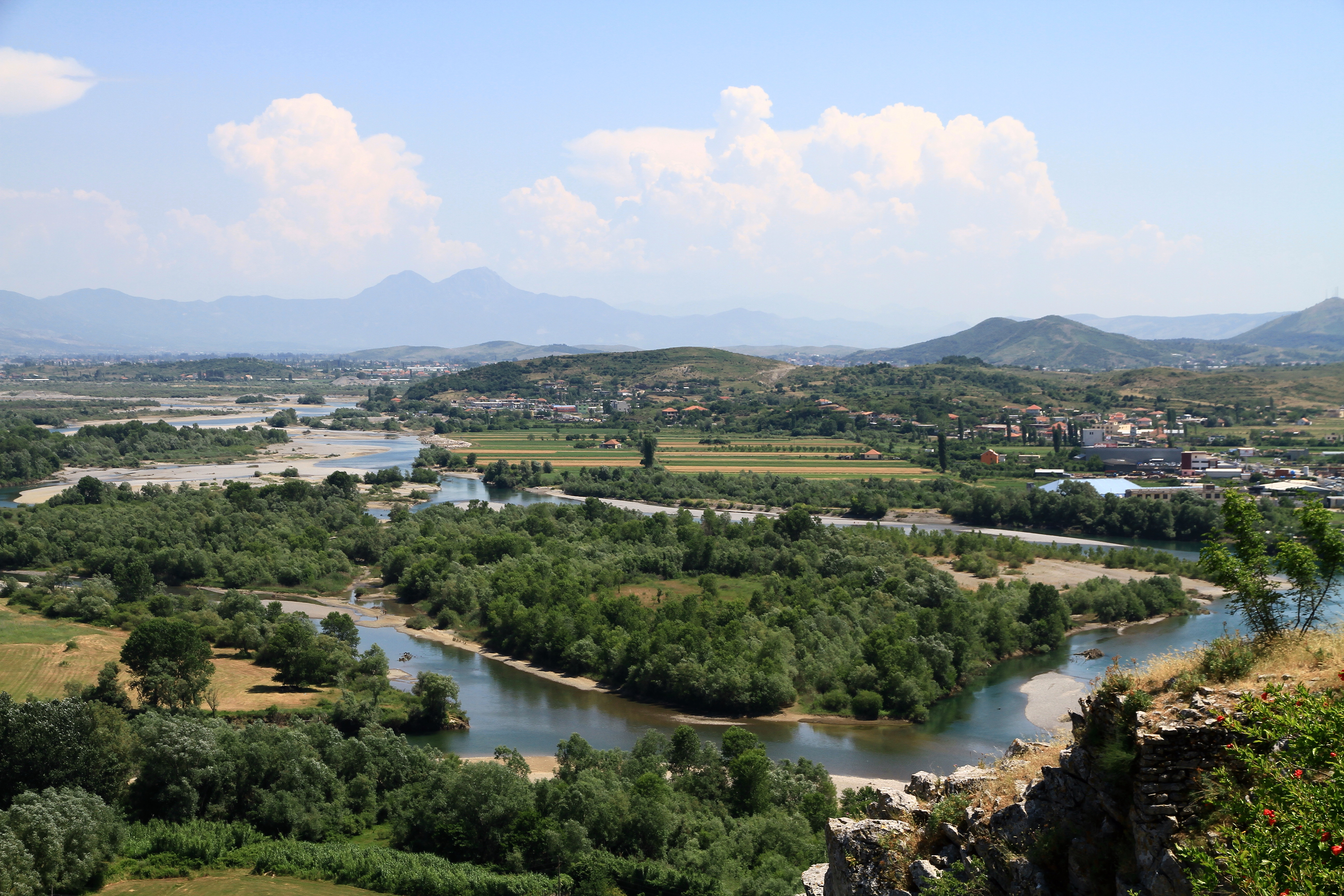 Albania.